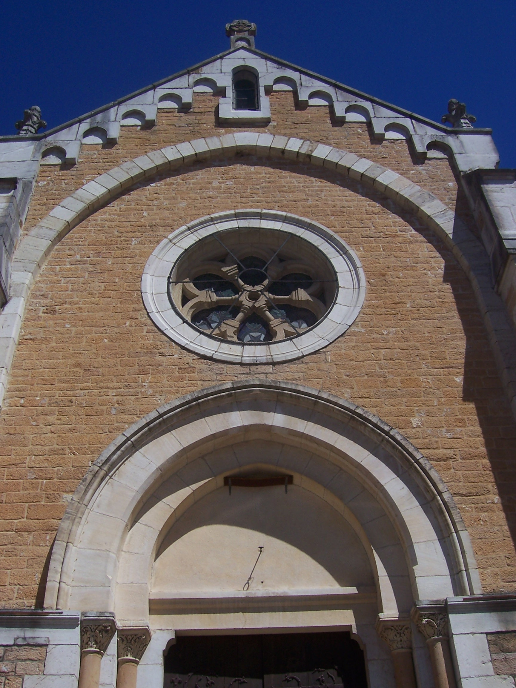 Eglise de Cuiseaux